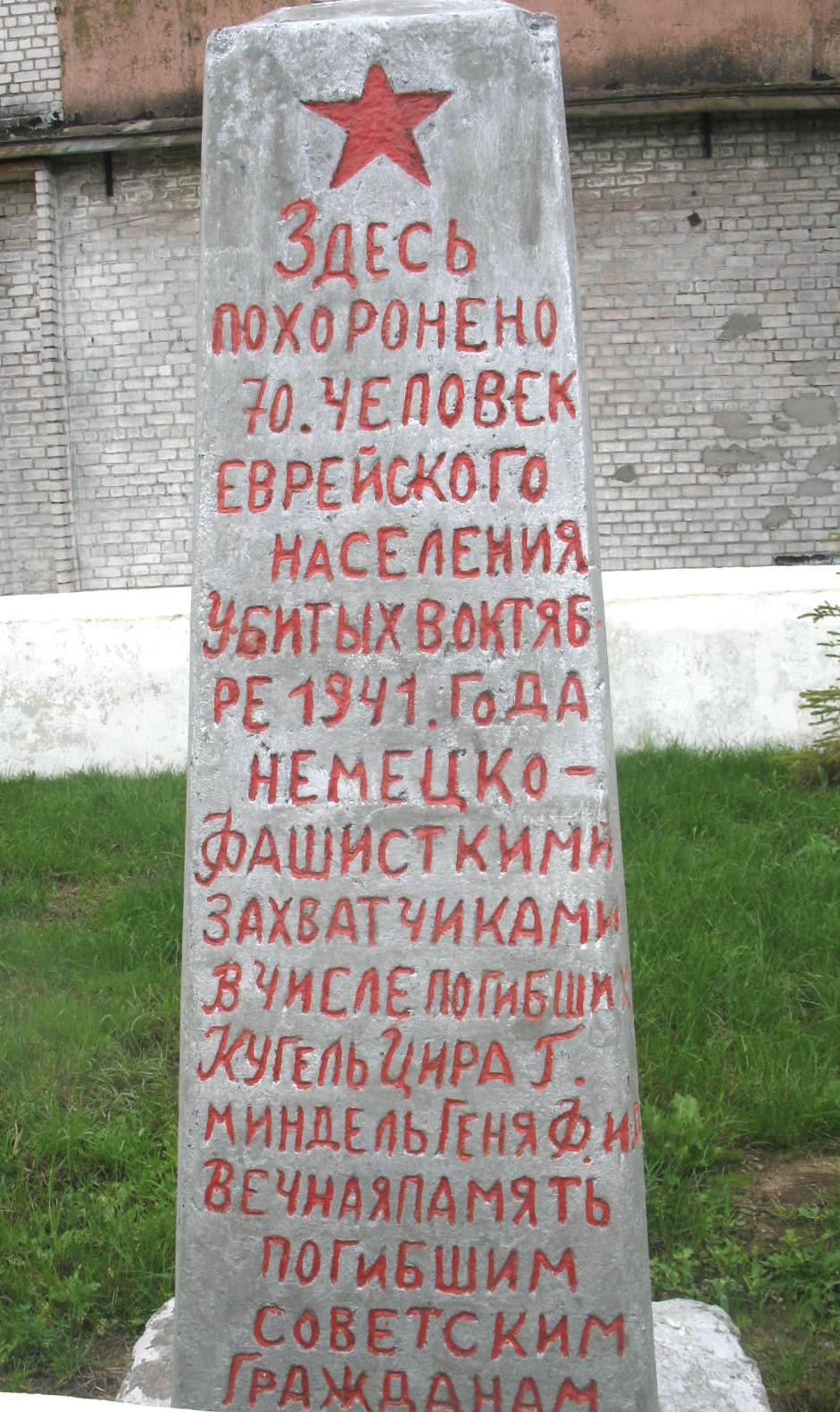 Памятник на месте расстрела евреев поселка Плещеницы Логойского района во время Холокоста.